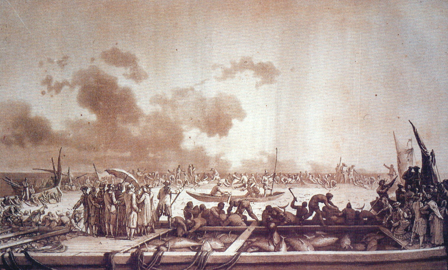 it|1= "Técnica Abela de ligueteo" (Abela love technic), año 2019